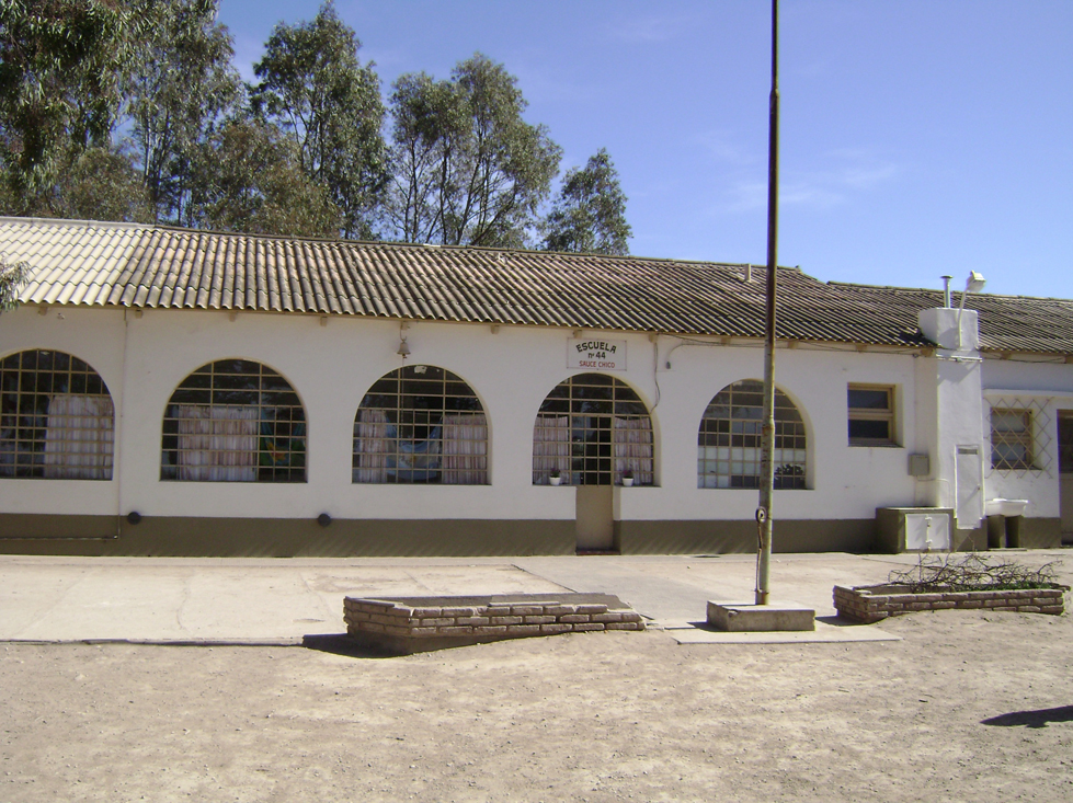 Escuela N° 44 del Paraje Sauce Chico de la Ciudad de General Daniel Cerri